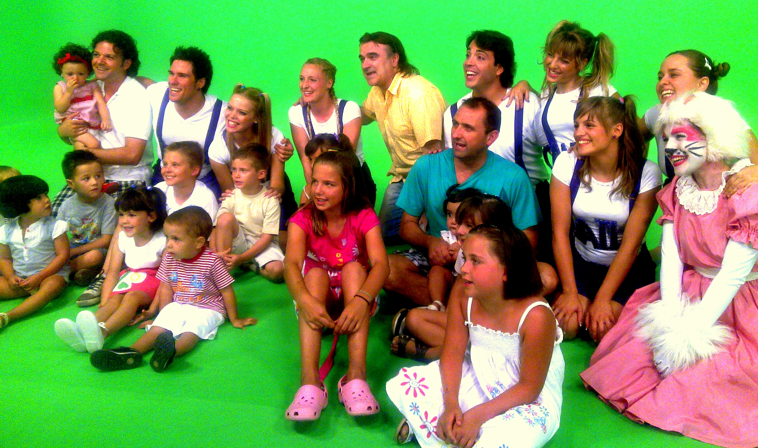 Grabacion DVD cantabaila 2010